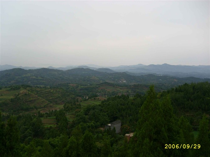 蓬安县农村